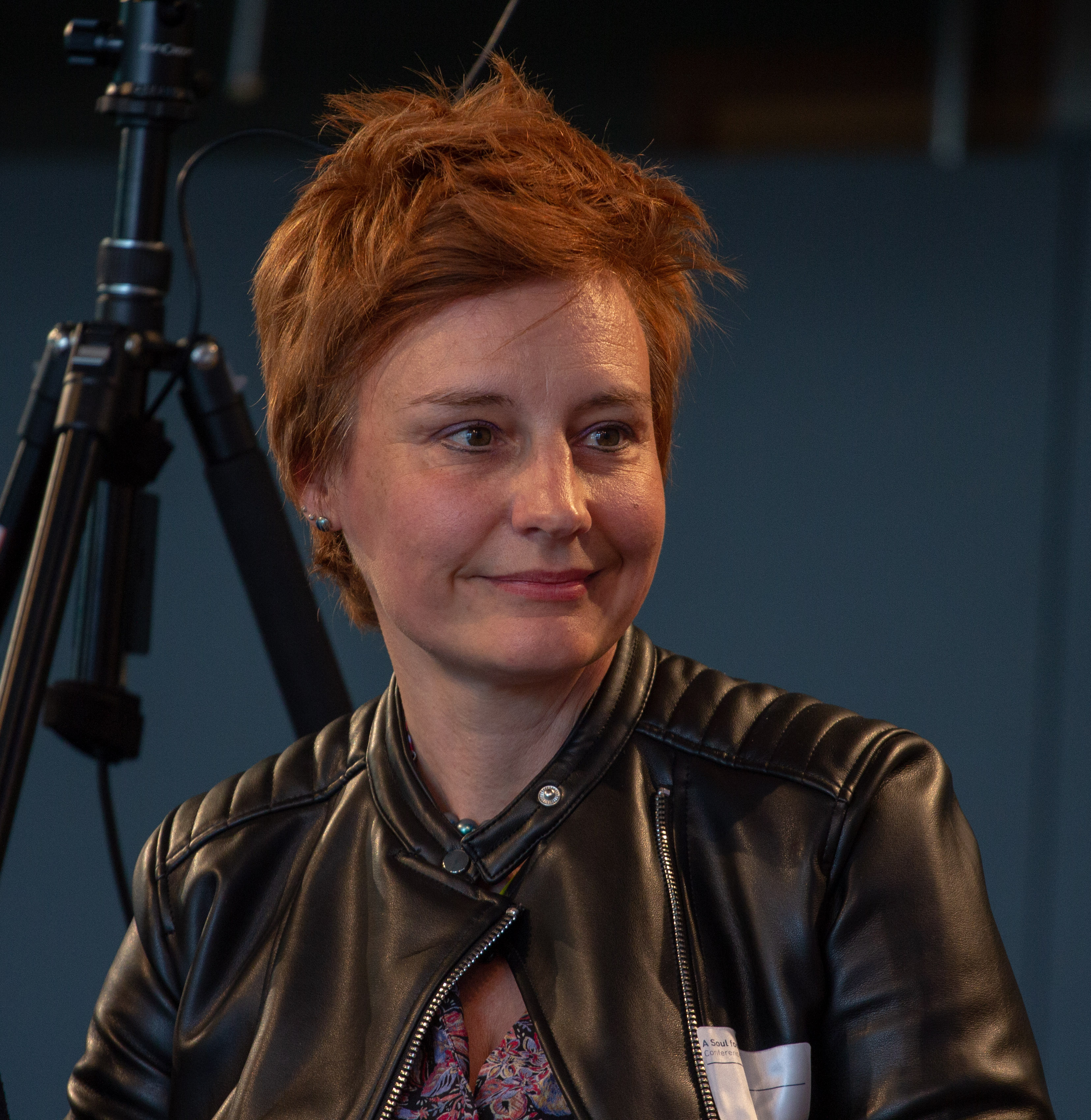 Veranstaltung "A Soul for Europe" am 13. April 2019 in der Akademie der Künste in Berlin. Representatives of European Parties: Carl Grouwet (ALDE), Damian Boeselager (Volt), Hannah Neumann (Bündnis 90/Die Grünen), Violeta Tomic (European Left), Yanis Varoufakis (DIEM25), Elmar Brok (MEP European People’s Party). With: Tanja Dückers, Noémi Kiss, Katja Sinko, Kathrin Röggla and Mia Florentine Weiss. Intervention by Volker Schlöndorff and Hannes Swoboda (former MEP). Moderation: Volker Hassemer